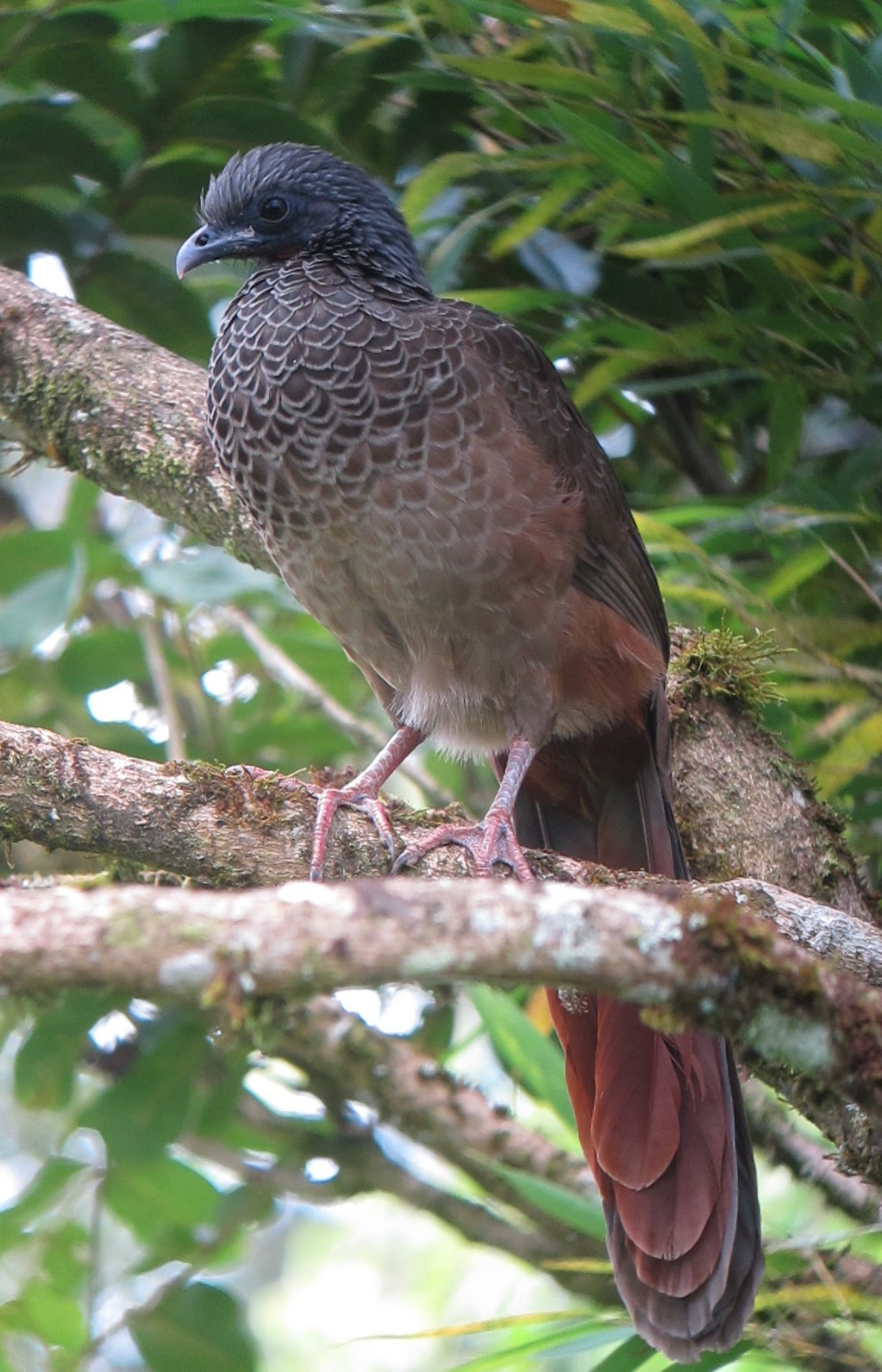 Rionegro. Antioquia, Colombia Endémico